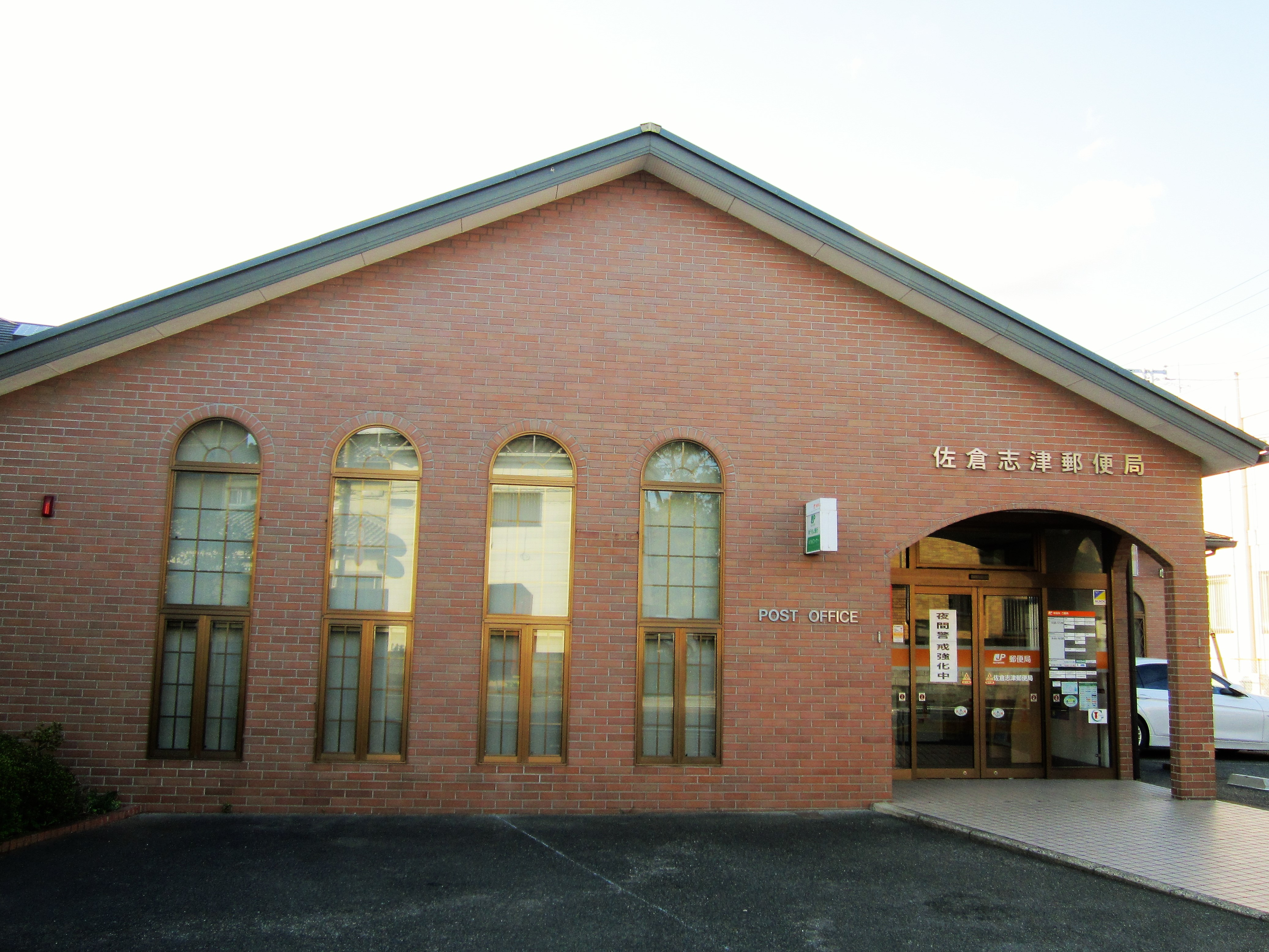 佐倉志津郵便局（佐倉市上志津）